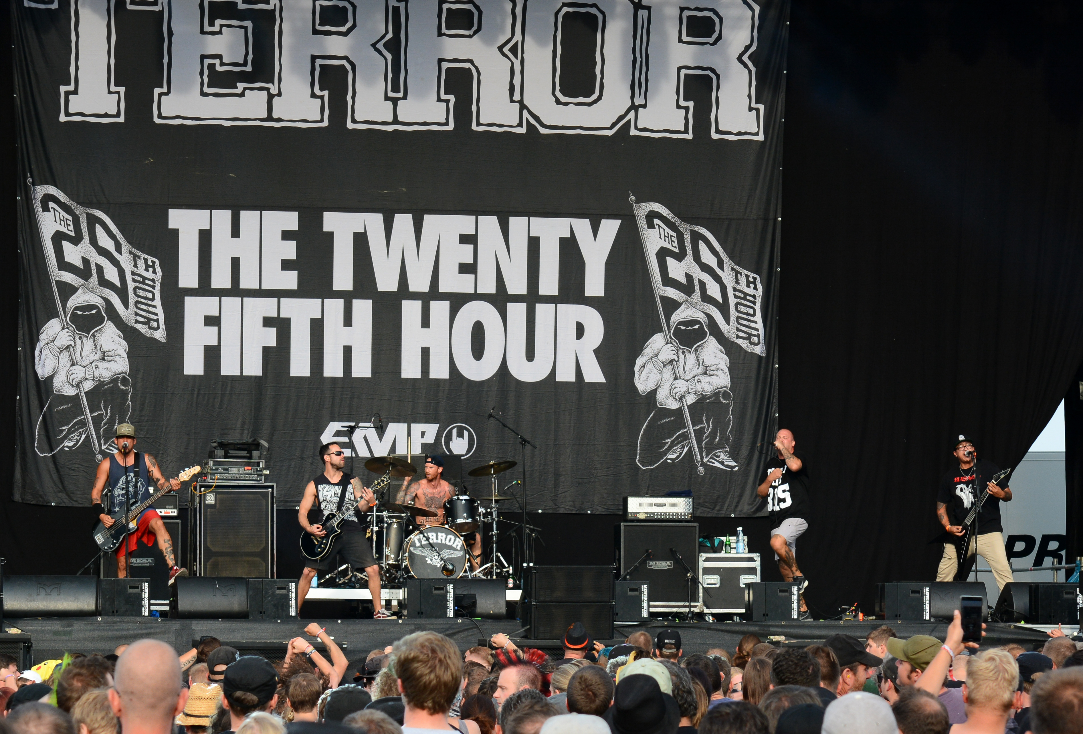 Terror auf dem Reload Festival 2017